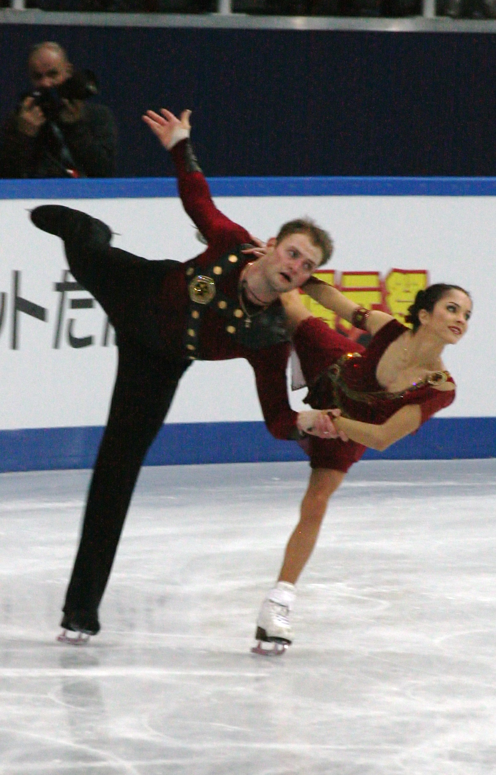 Вера Базарова и Юрий Ларионов (Россия) на финале Гран-при 2012-2013. Произвольная программа.